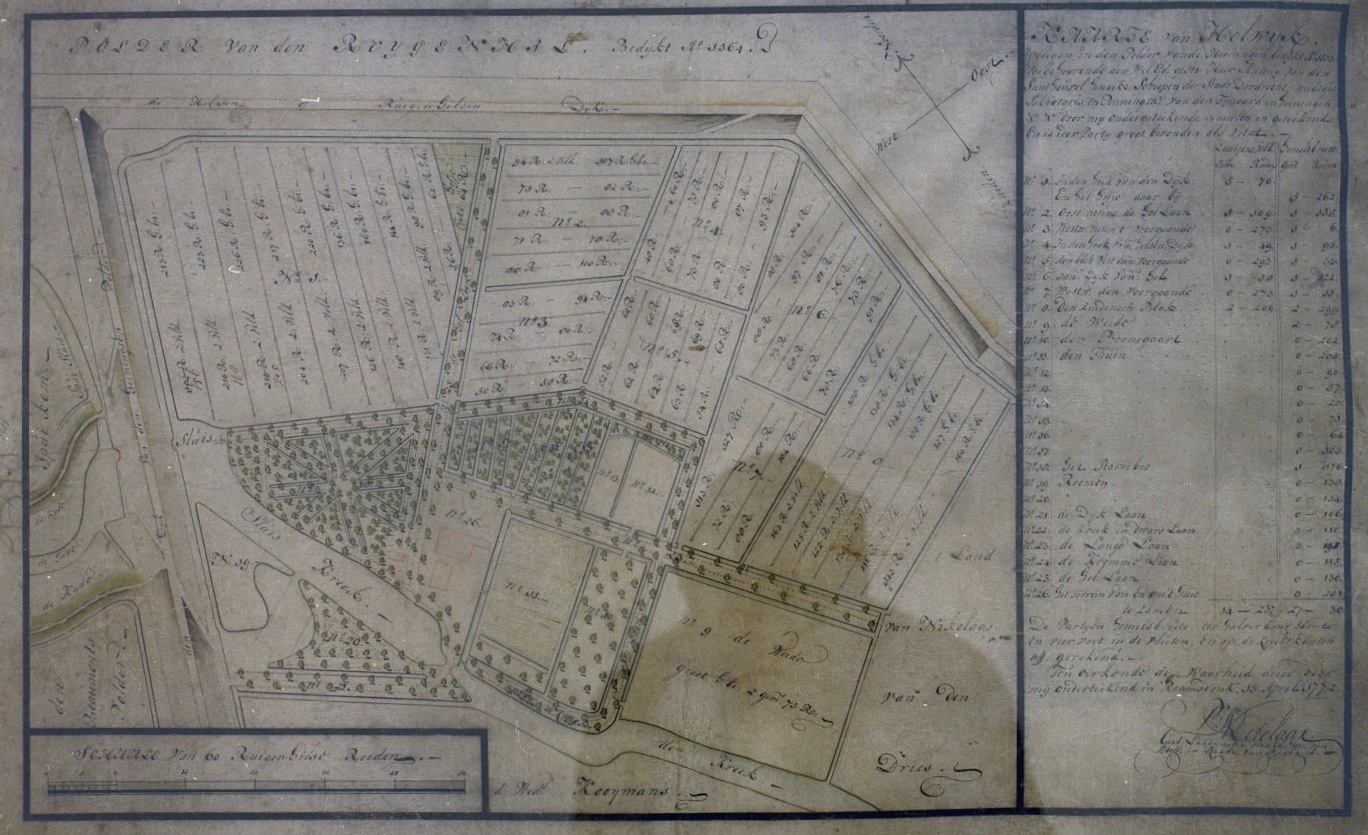 Kaart van het omliggende park in 1772